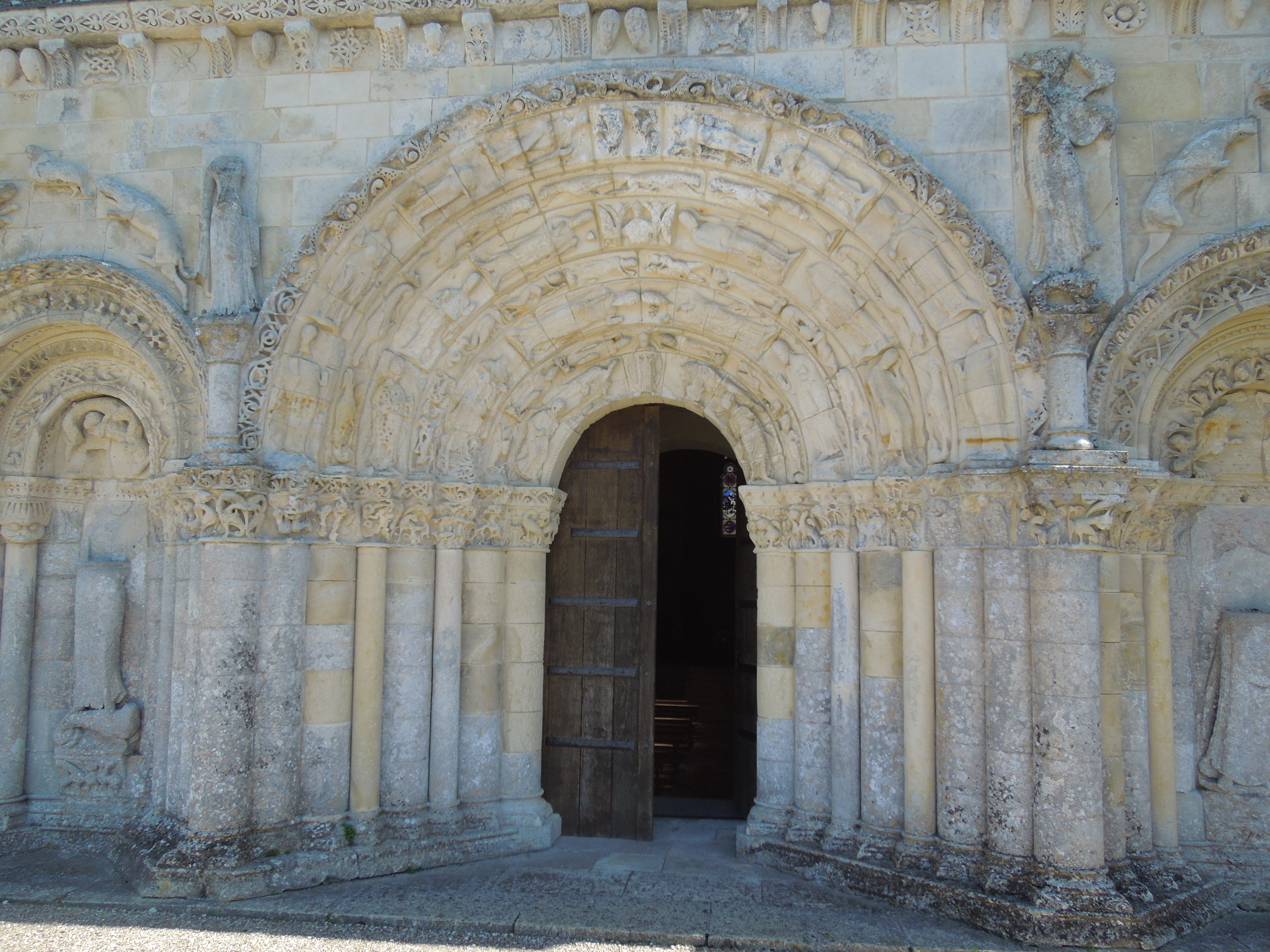 Portal der katholischen Pfarrkirche Saint-Martin in Chadenac